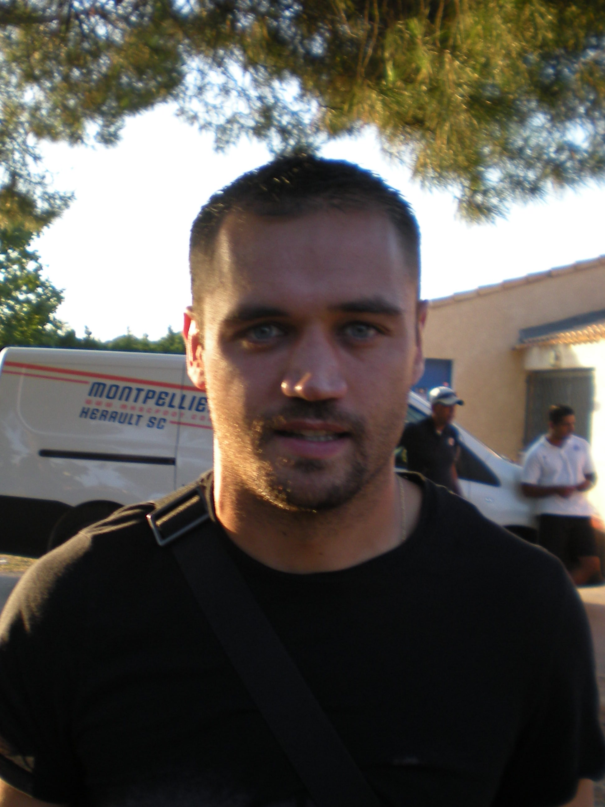 Laurent Pionnier.